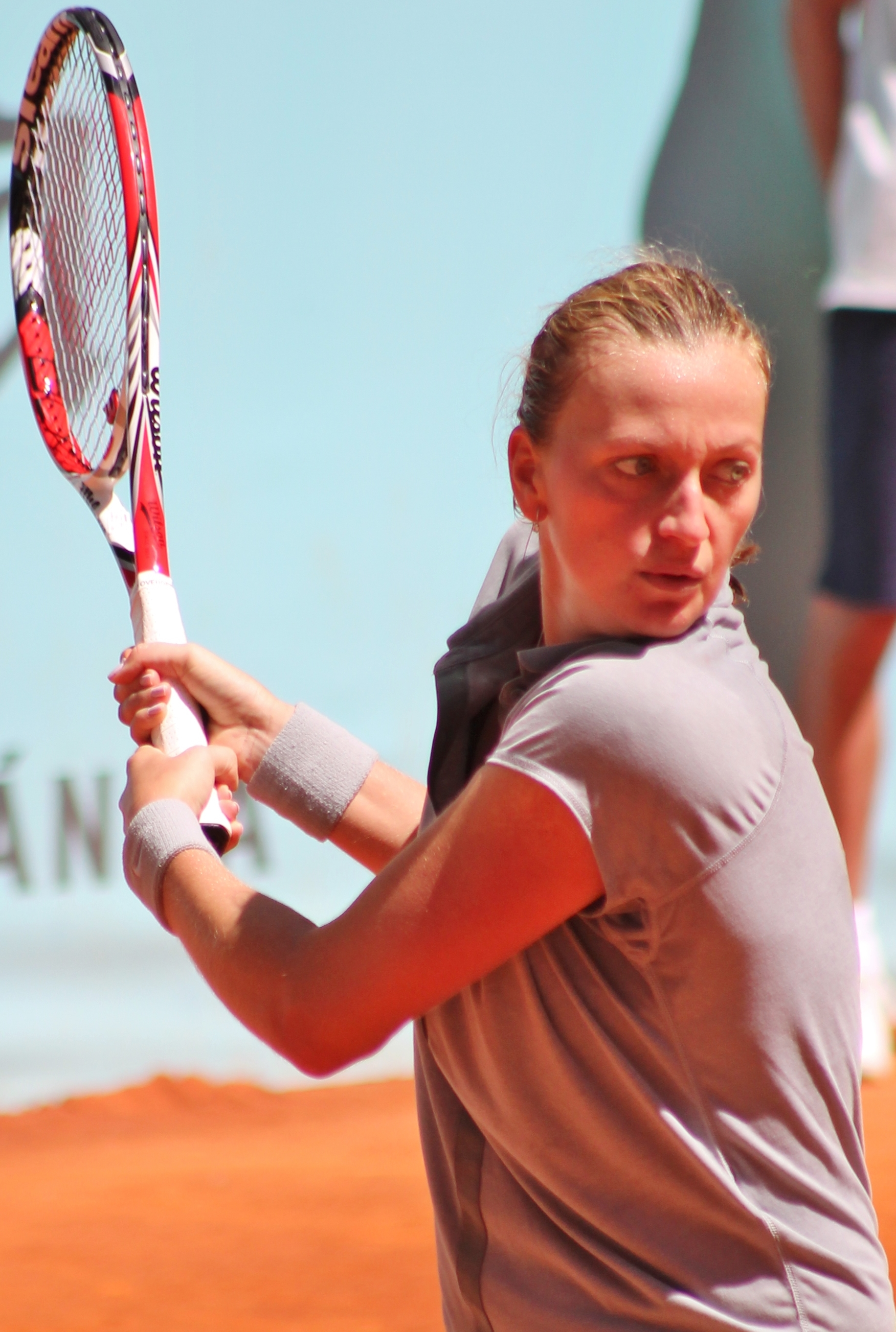 Kvitova MA14 (4)